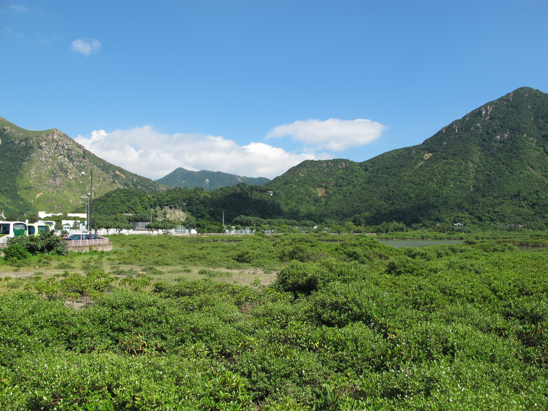 Tai O Wetland